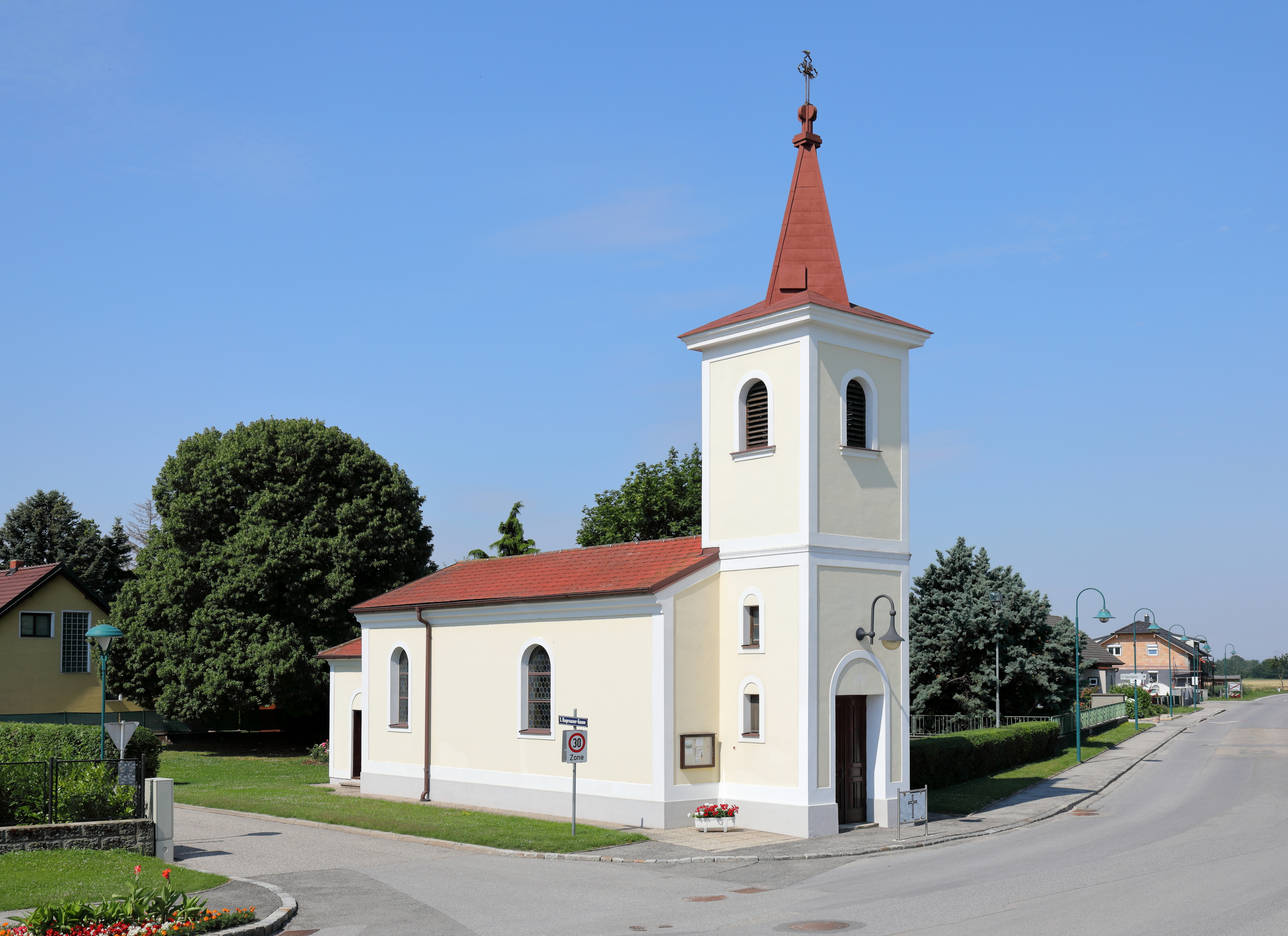 Ostnordostansicht der röm.-kath. Filialkirche hl. Anna in Rutzendorf, ein Dorf in der niederösterreichischen Stadtgemeinde Groß-Enzersdorf. Die kleine spätbarocke Dorfkirche mit schlichtem Langhaus und vorgesetztem Turm wurde in der 2. Hälfte des 18. Jahrhunderts errichtet.